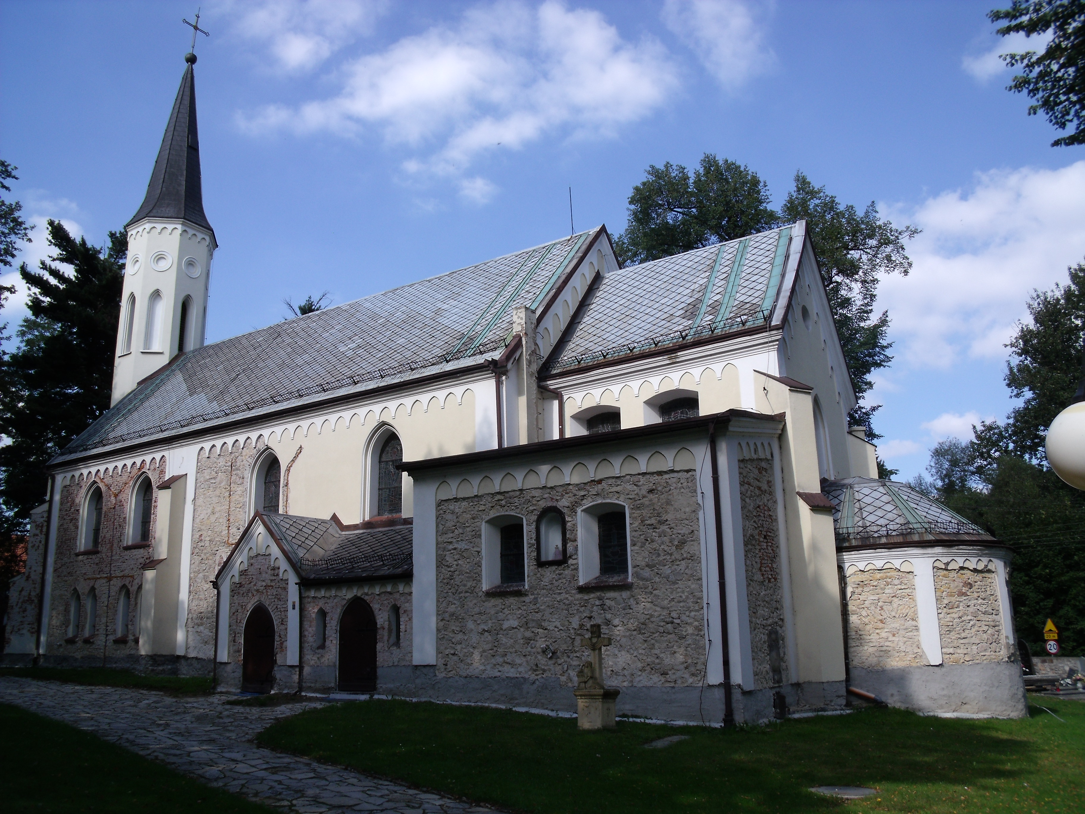 Mikołów Mokre - kościół p.w. św. Wawrzyńca (zabytek nr A/727/66 z 15.06.1966)